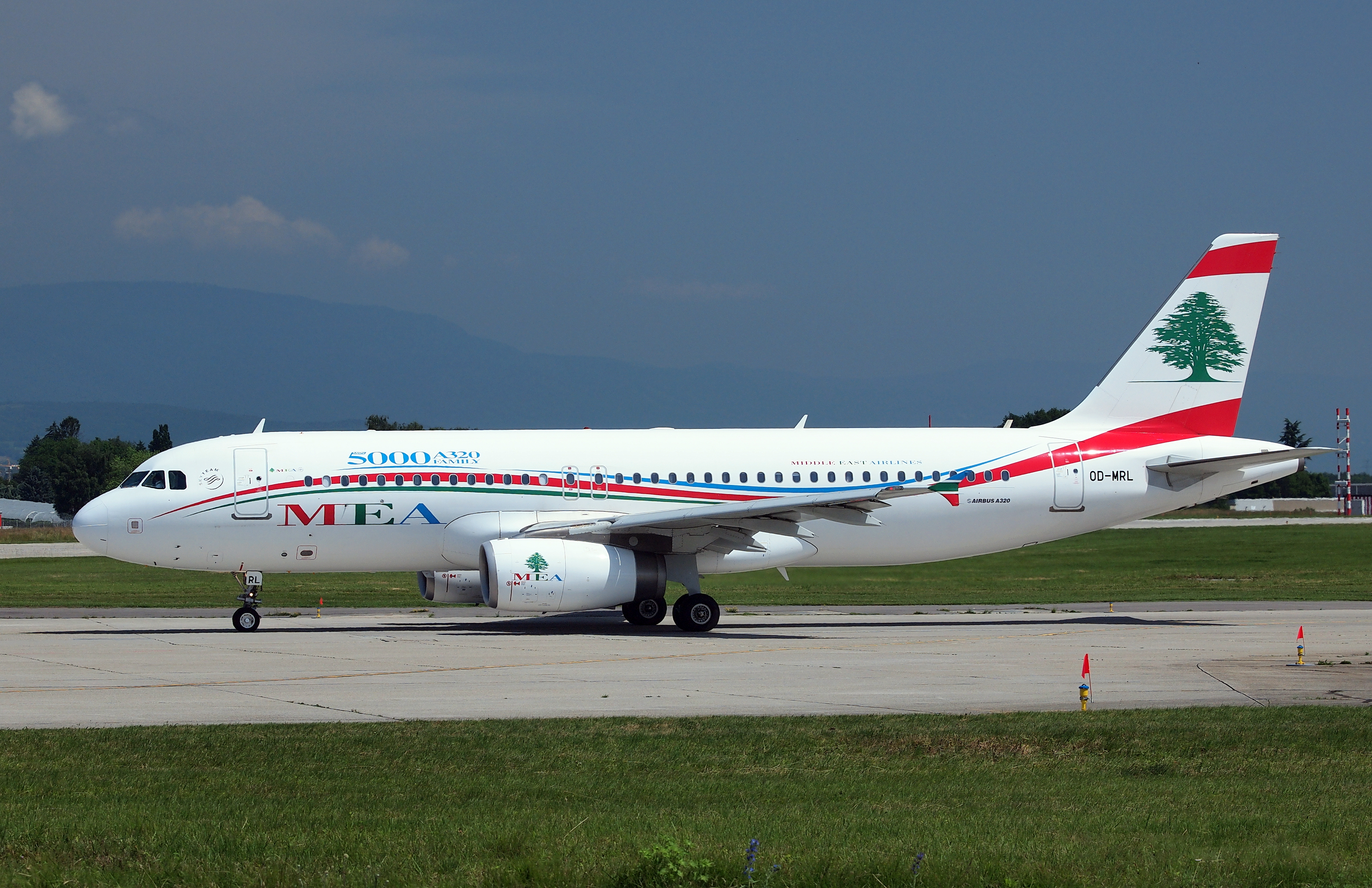 GVA 18.06.2013